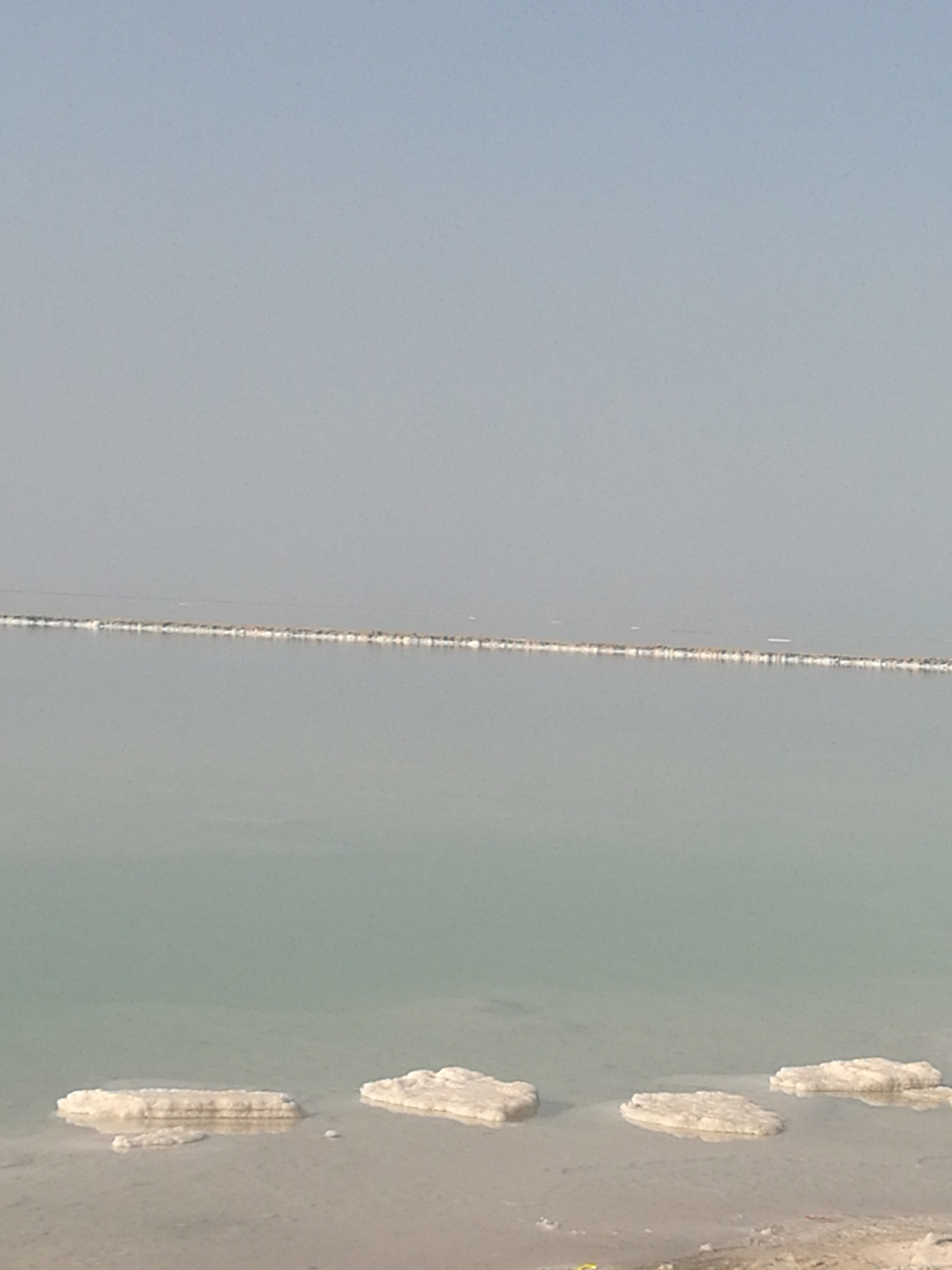 גבישי מלח בים המלח